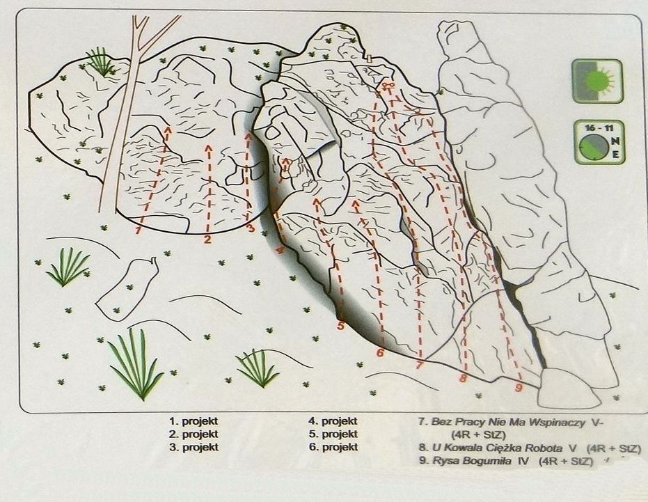 Nawratilowa w Dolinie Będlkowskiej (skałoplan)